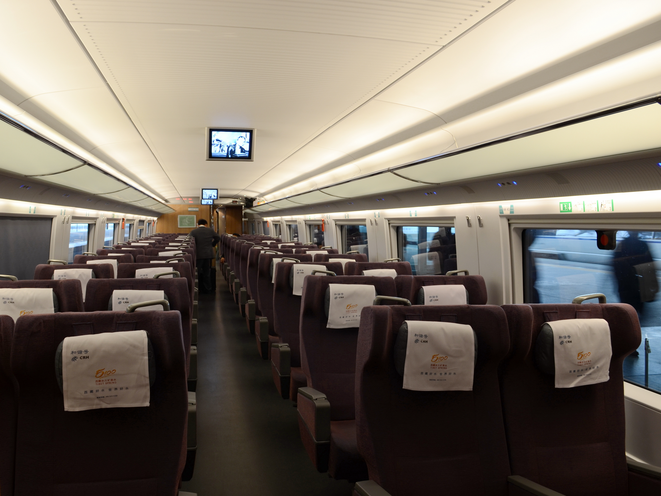 武广高铁CRH3C一等座车